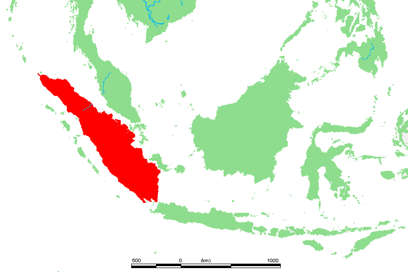 ID Tidore.PNG